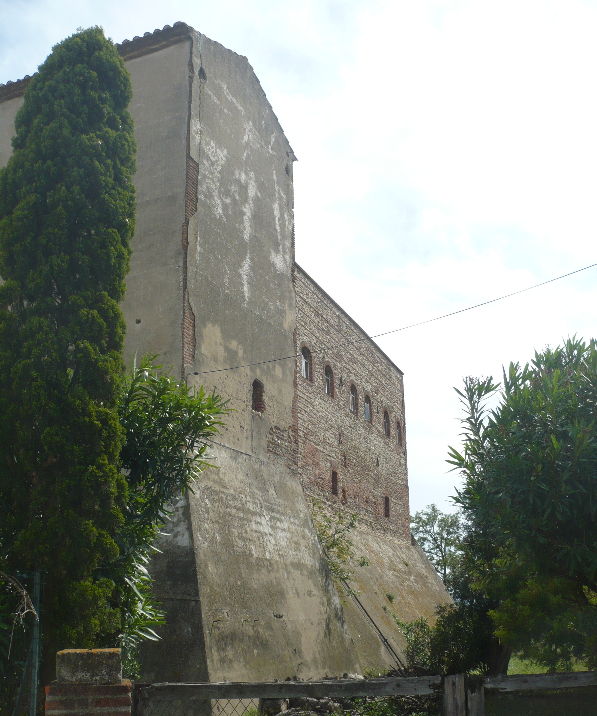 Vue d'ensemble de la façade nord-ouest du château de Corneilla-del-Vercol